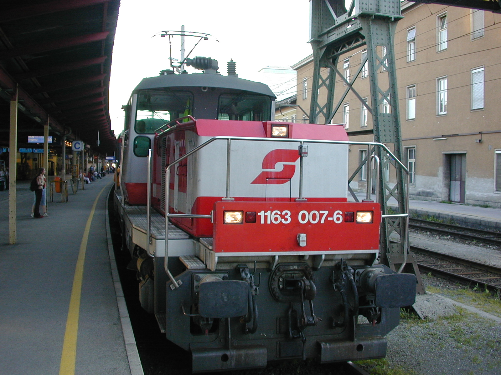 de: ÖBB 1163 007-6 beim Verschub eines InterCity in Salzburg Hbf en: ÖBB 1163 007-6 shunting an InterCity train in Salzburg Hbf (main station)